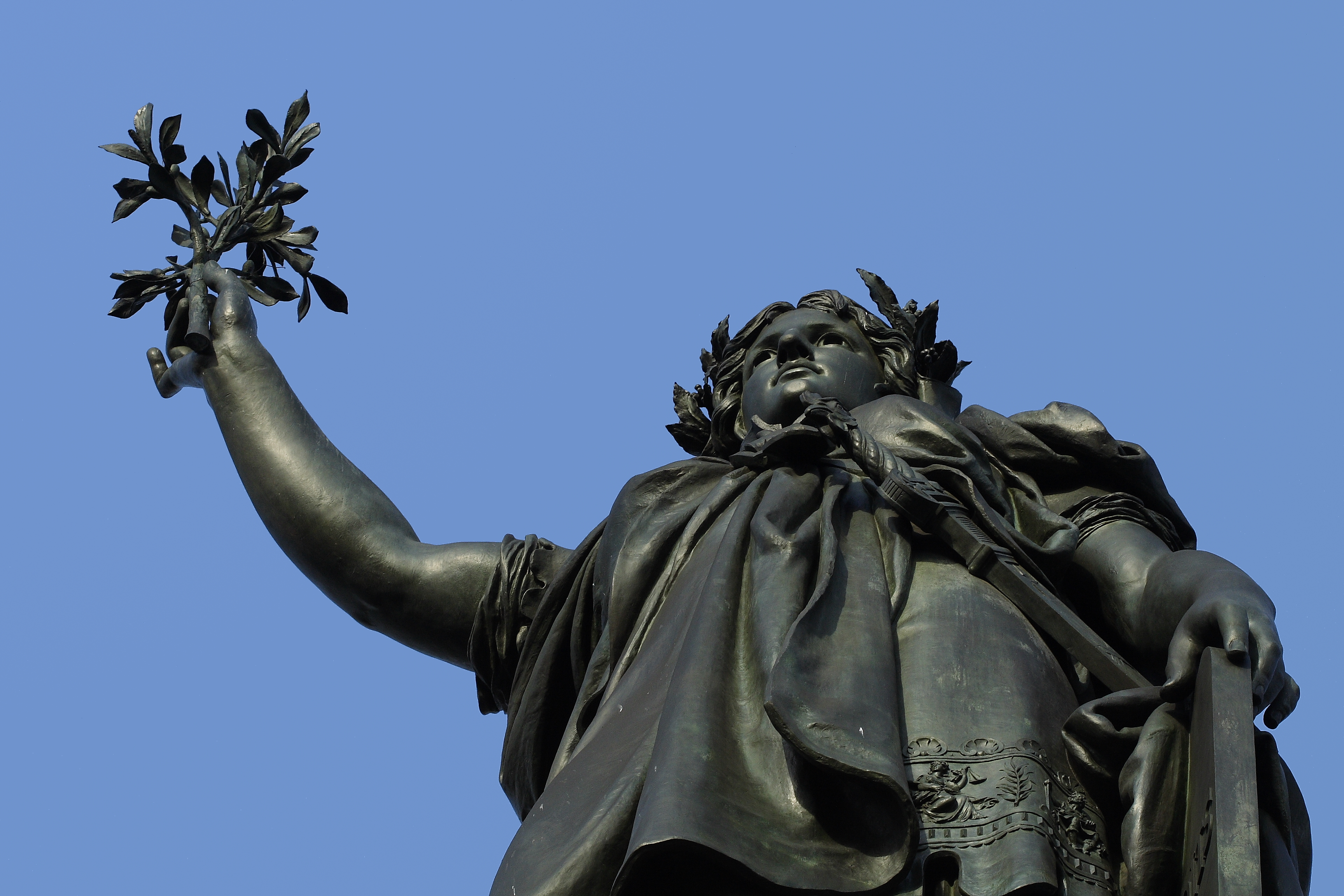 Statue de Marianne par Léopold Morice, place de la République, Paris.